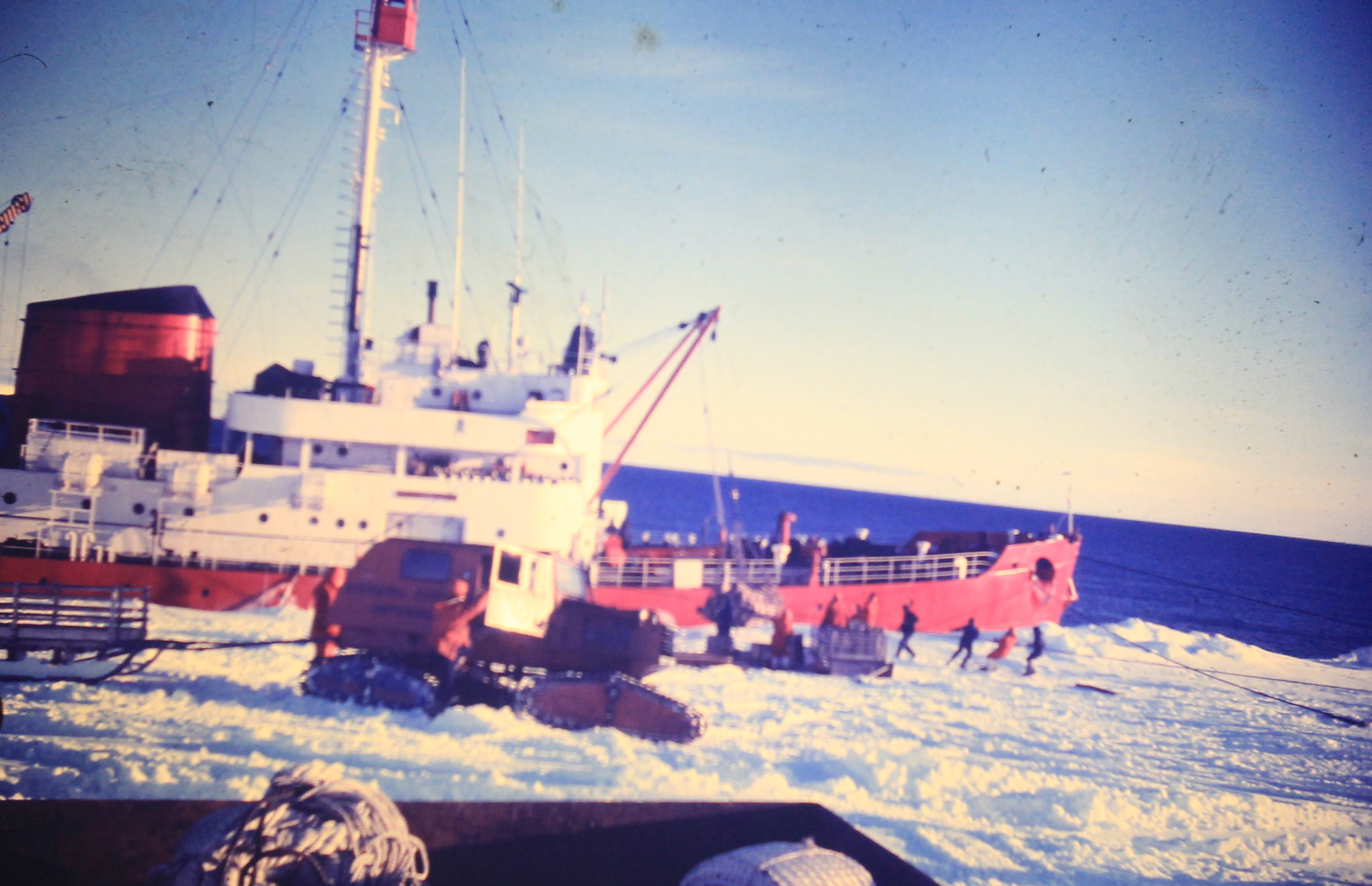 Fotos tomadas por Jorge Giammatteo durante su viaje a la Antártida como meteorólogo, en 1973.